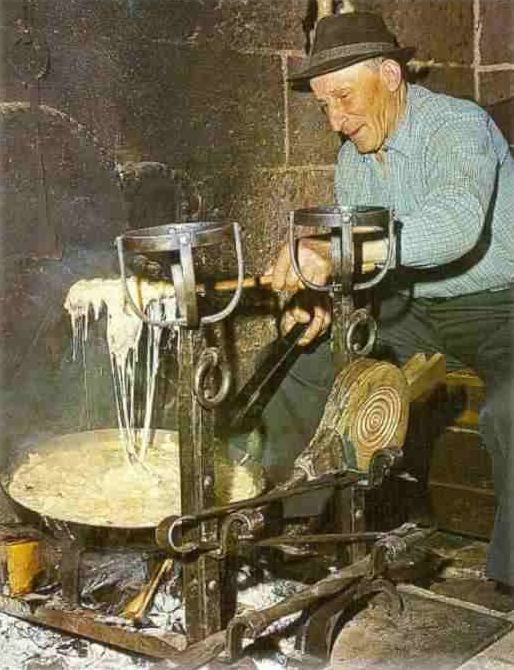 Cantou, Cantal, grand père préparant une truffade